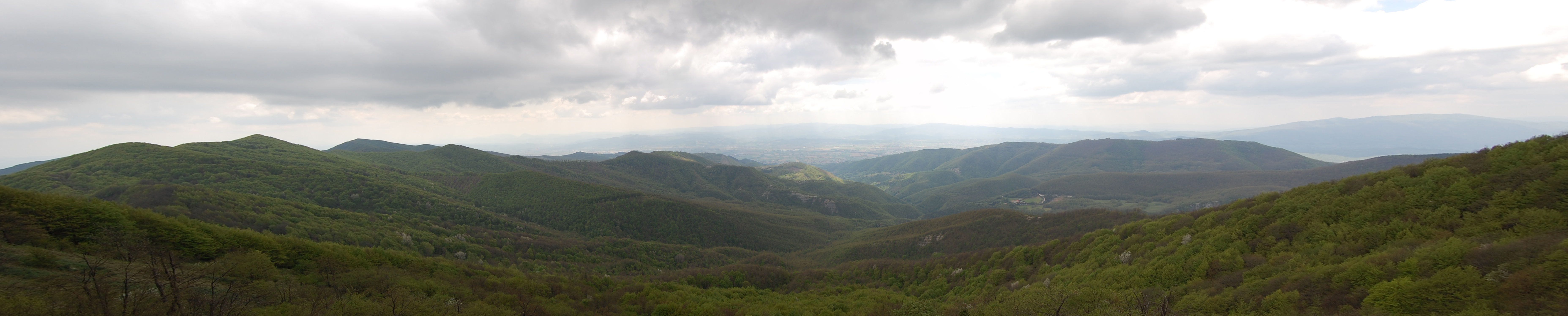 Panorama dall'alpe della luna - Pratin del bravo